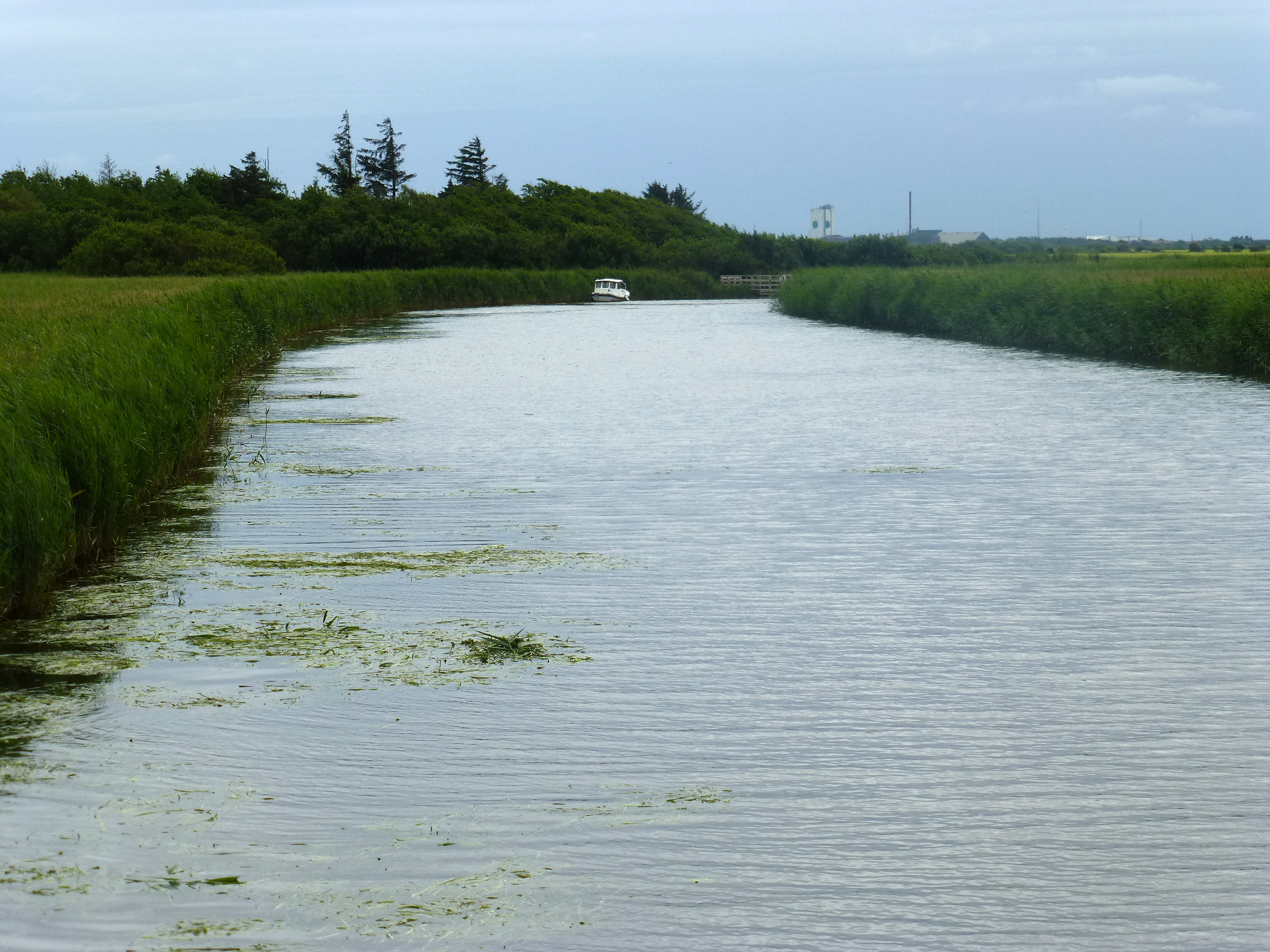 Vonå set mod syd fra Vonå Engbro